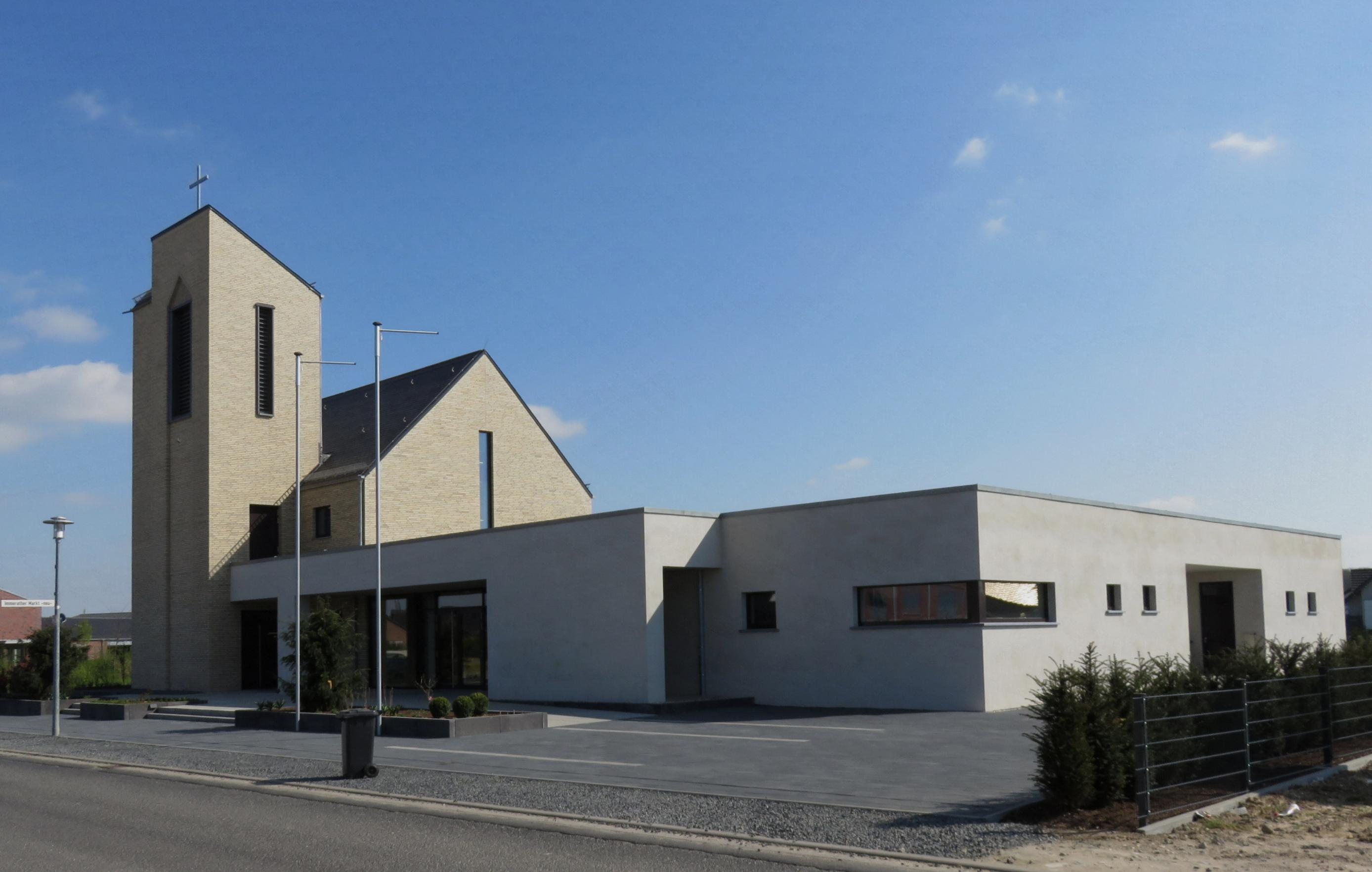 Bild aus der Kapelle St. Lambertus in Immerath (neu)